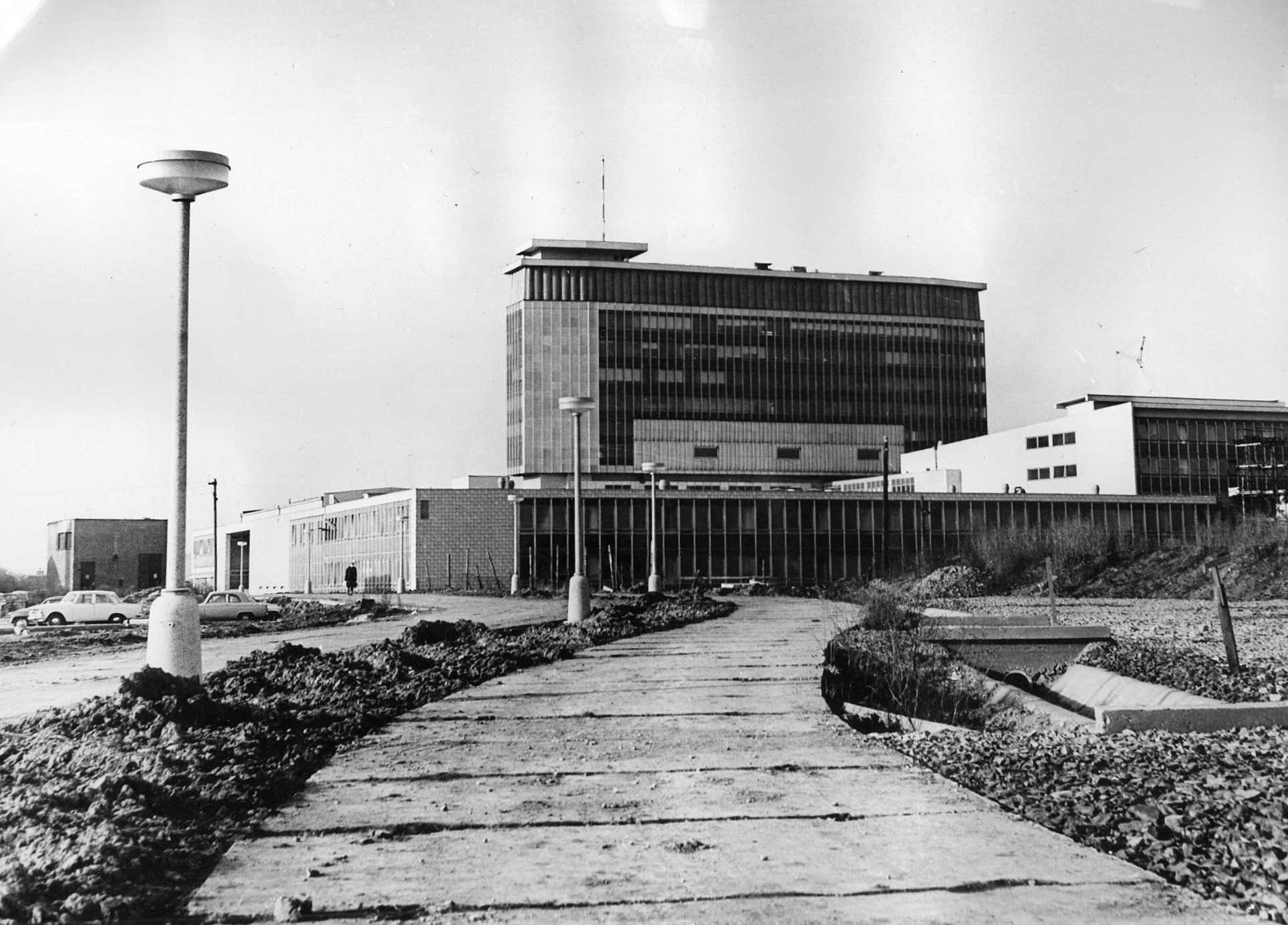 Nově postavený komplex budov Československé televize v Praze na Kavčích horách, 1971.